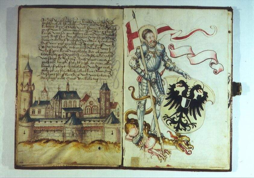 Salbuch (Libell) des Klosters Naumburg (Wetterau) zu Kaichen mit Abbildungen der Burg Friedberg und dem Hl. Georg als Schutzpatron der Burg. Bebilderte Handschrift, 5. Dezember 1514. Staatsarchiv Marburg Urkunden Hanau, Kloster Naumburg, 1514 Dez. 5.